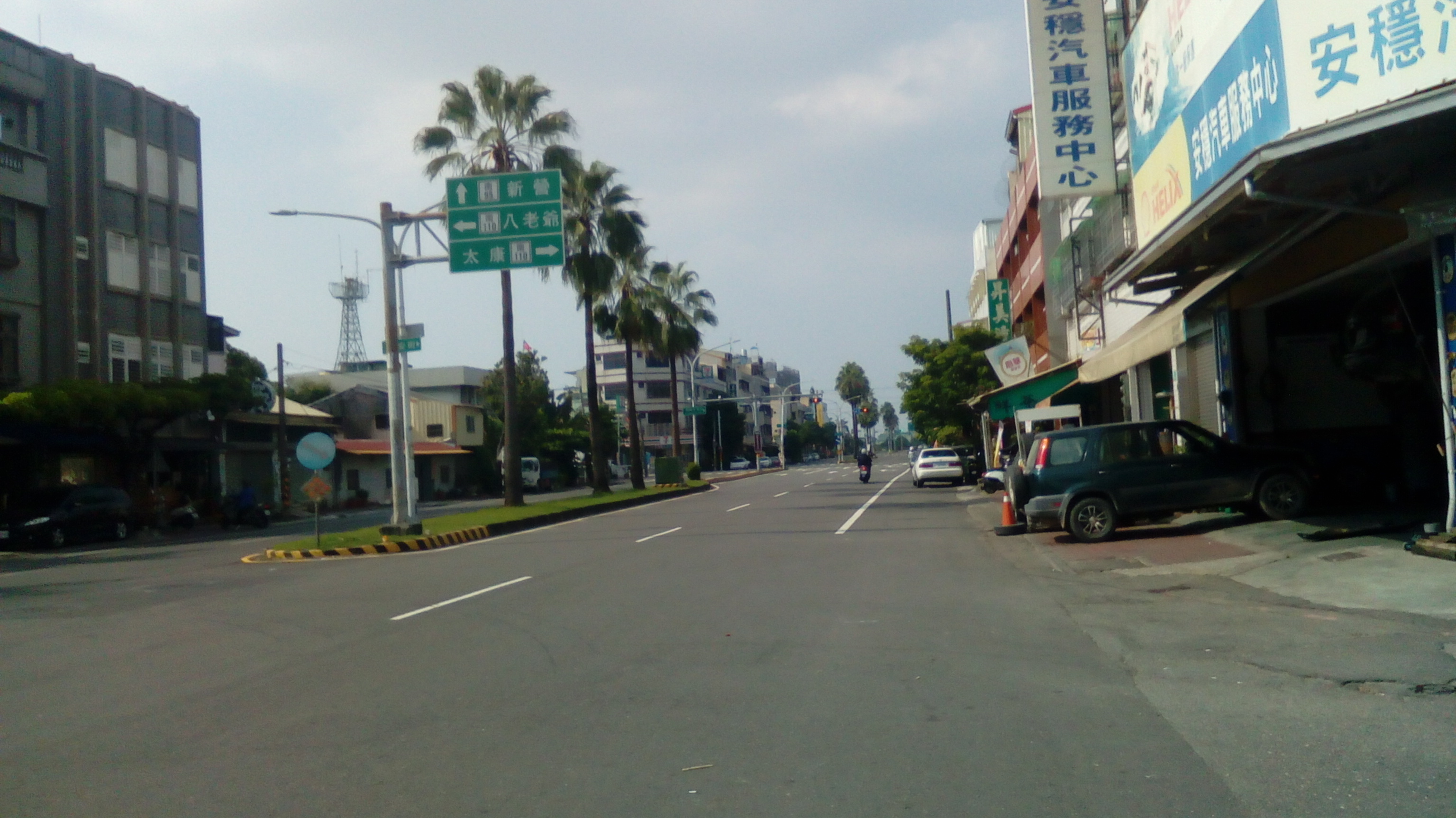 柳營路一段